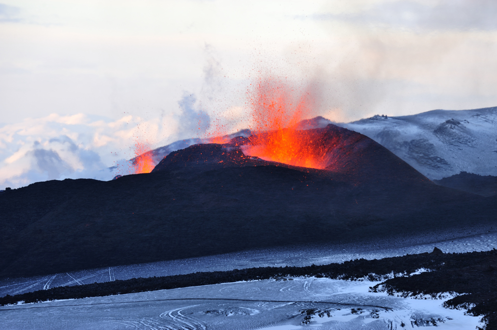 Seit 20.03.2010 ist auf dem Fimmvörðuháls ein Vulkanausbruch im Gange, der aufgrund chemischer Analysen der ausgeworfenen Materialen dem System des Eyjafjallajökull zugerechnet wird.